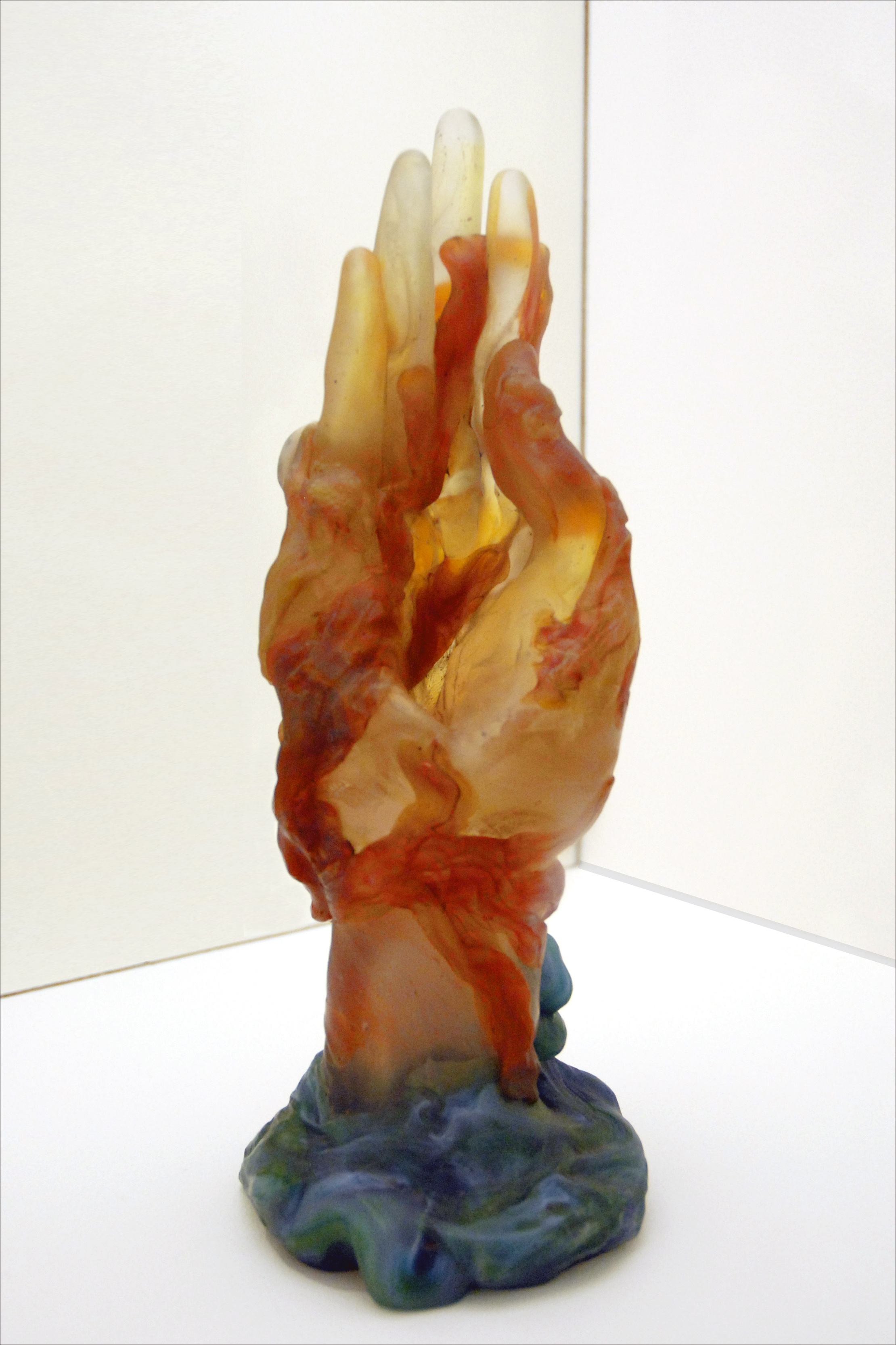 La main aux algues et aux coquillages 1904 Emile Gallé (1846-1904) Verre à plusieurs couches, travaillé à chaud, regravé à froid. Musée de l'Ecole de Nancy Achat 1971 Présenté dans l'exposition Chefs d'oeuvre au Centre Pompidou Metz